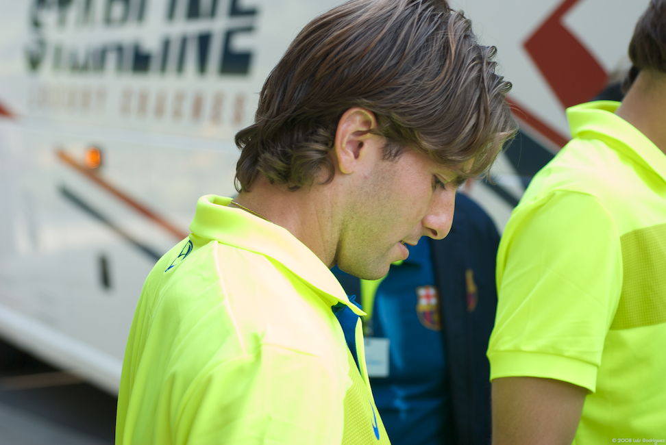 Maxwell Cabelino Andrade